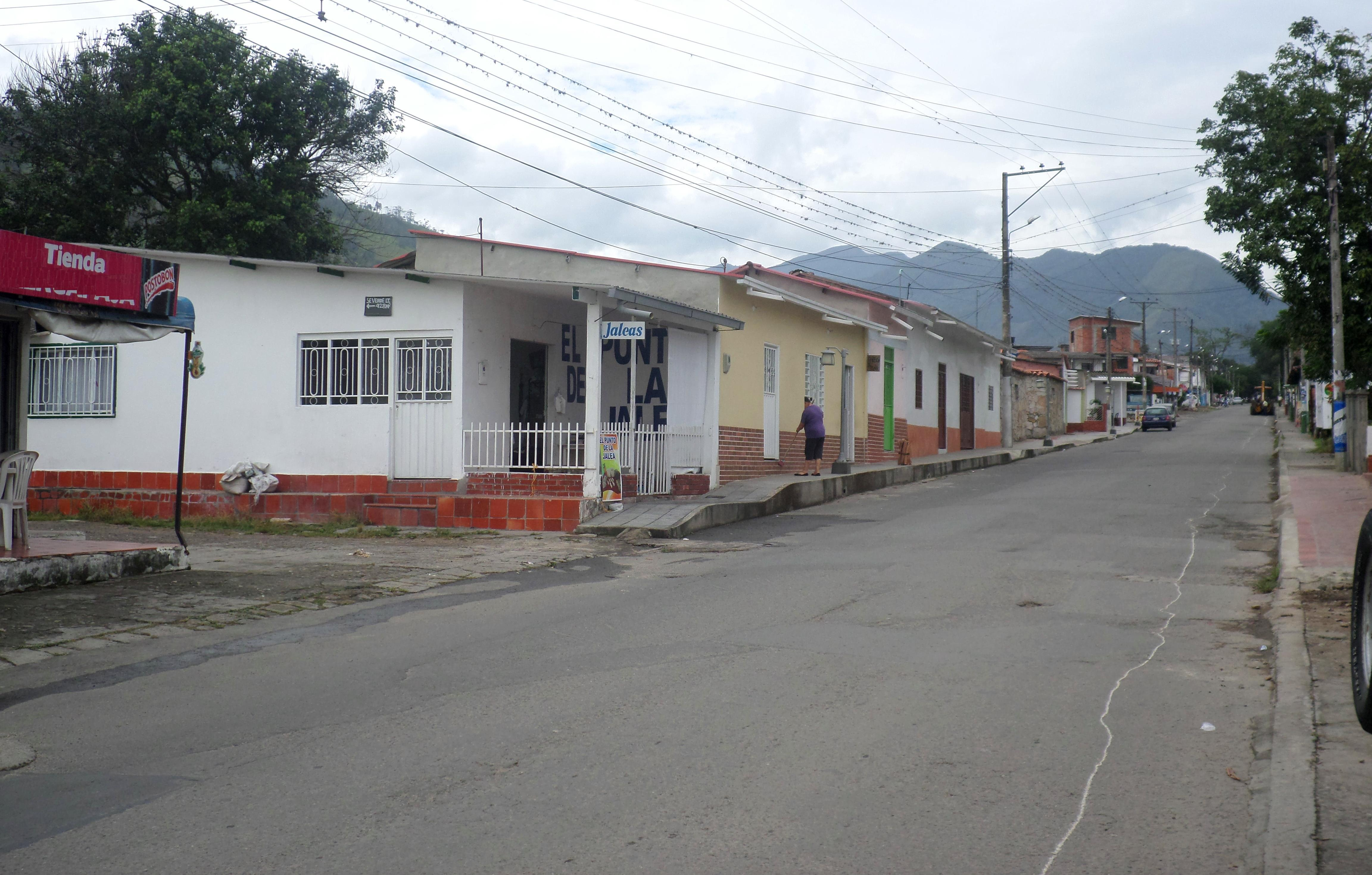 Calle en Chinacotá, Norte de Santander - Colombia